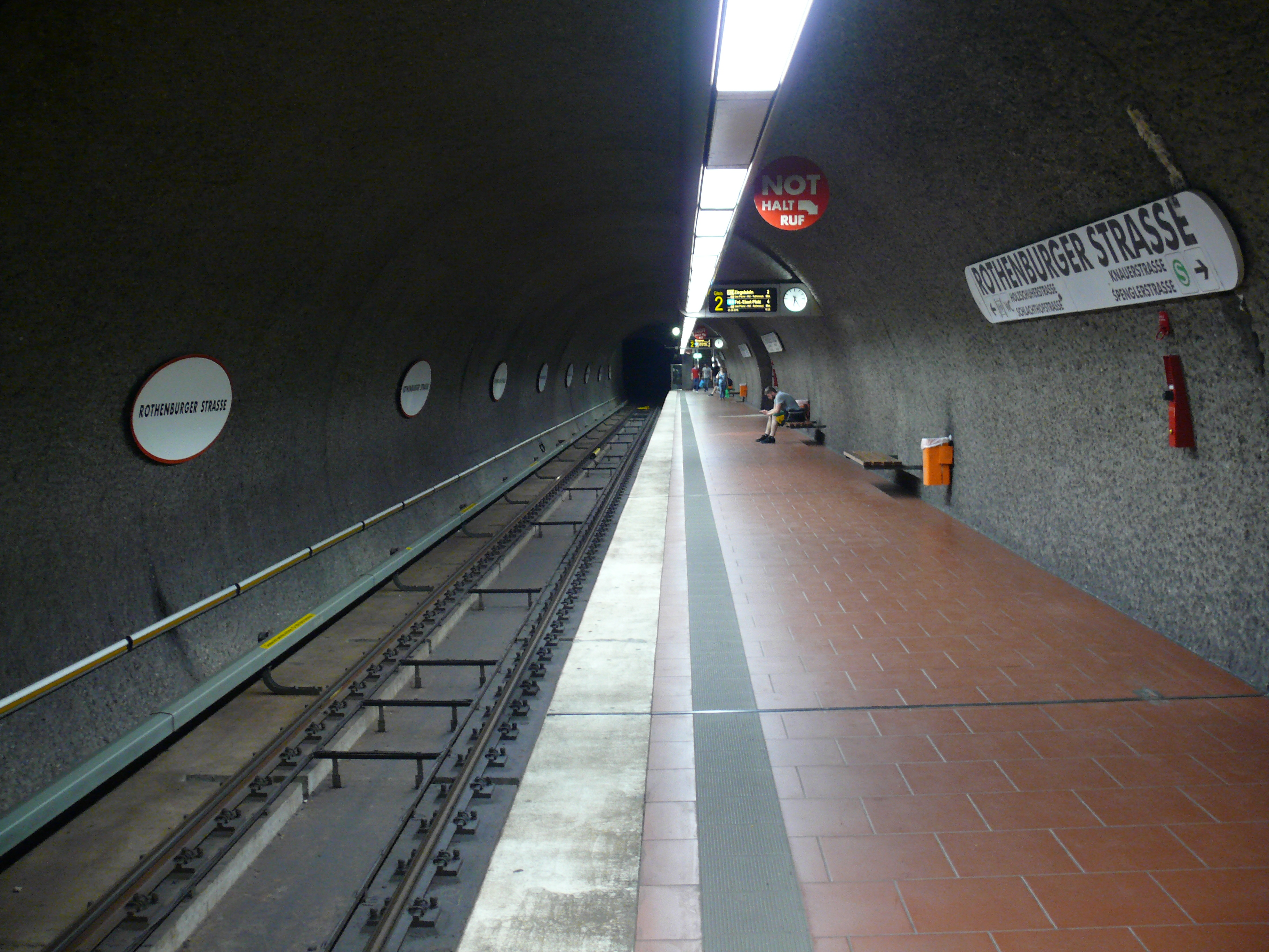 Gleis 2 am U-Bahnhof Rothenburger Straße in Nürnberg.